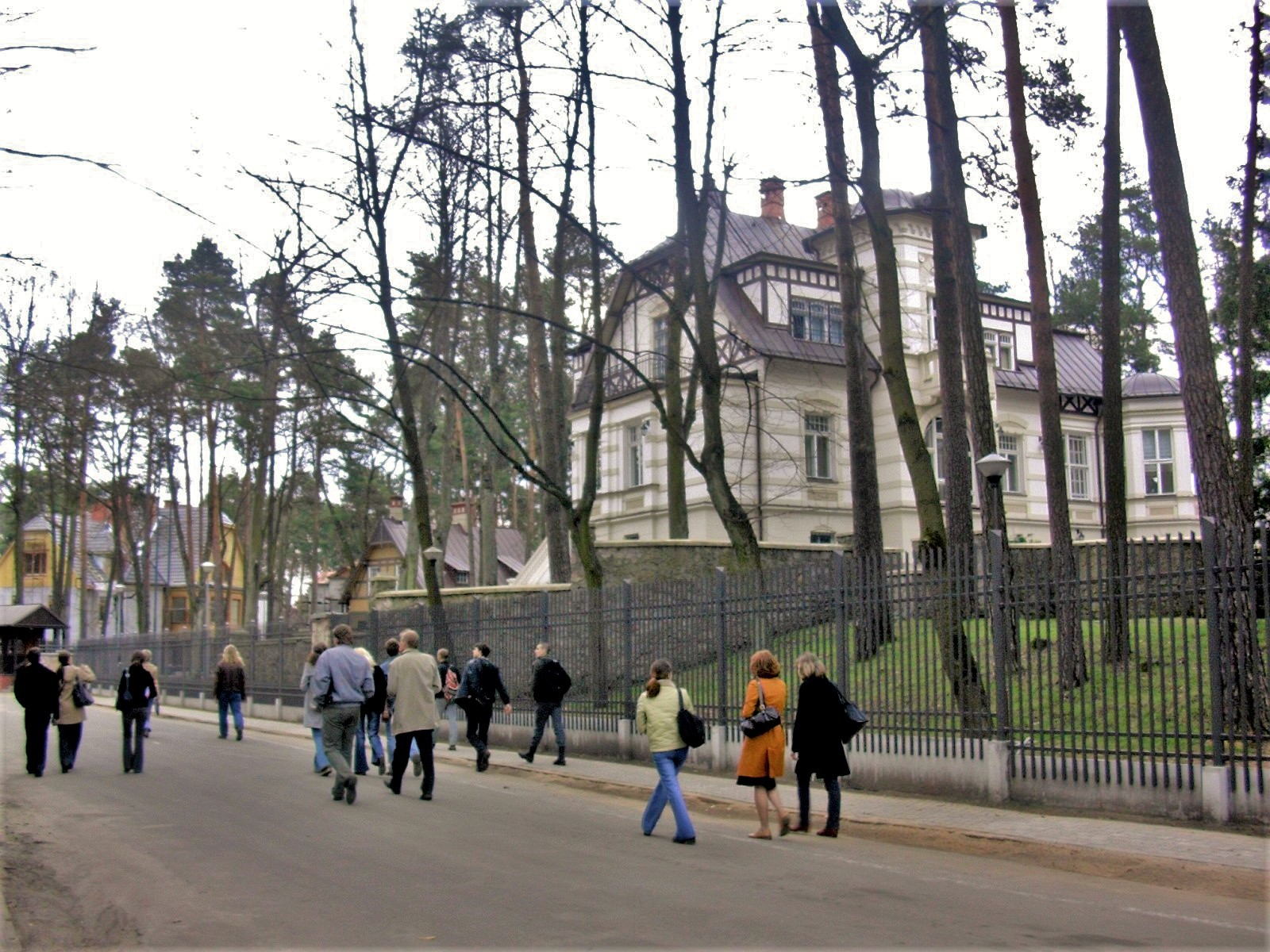 Межапаркс